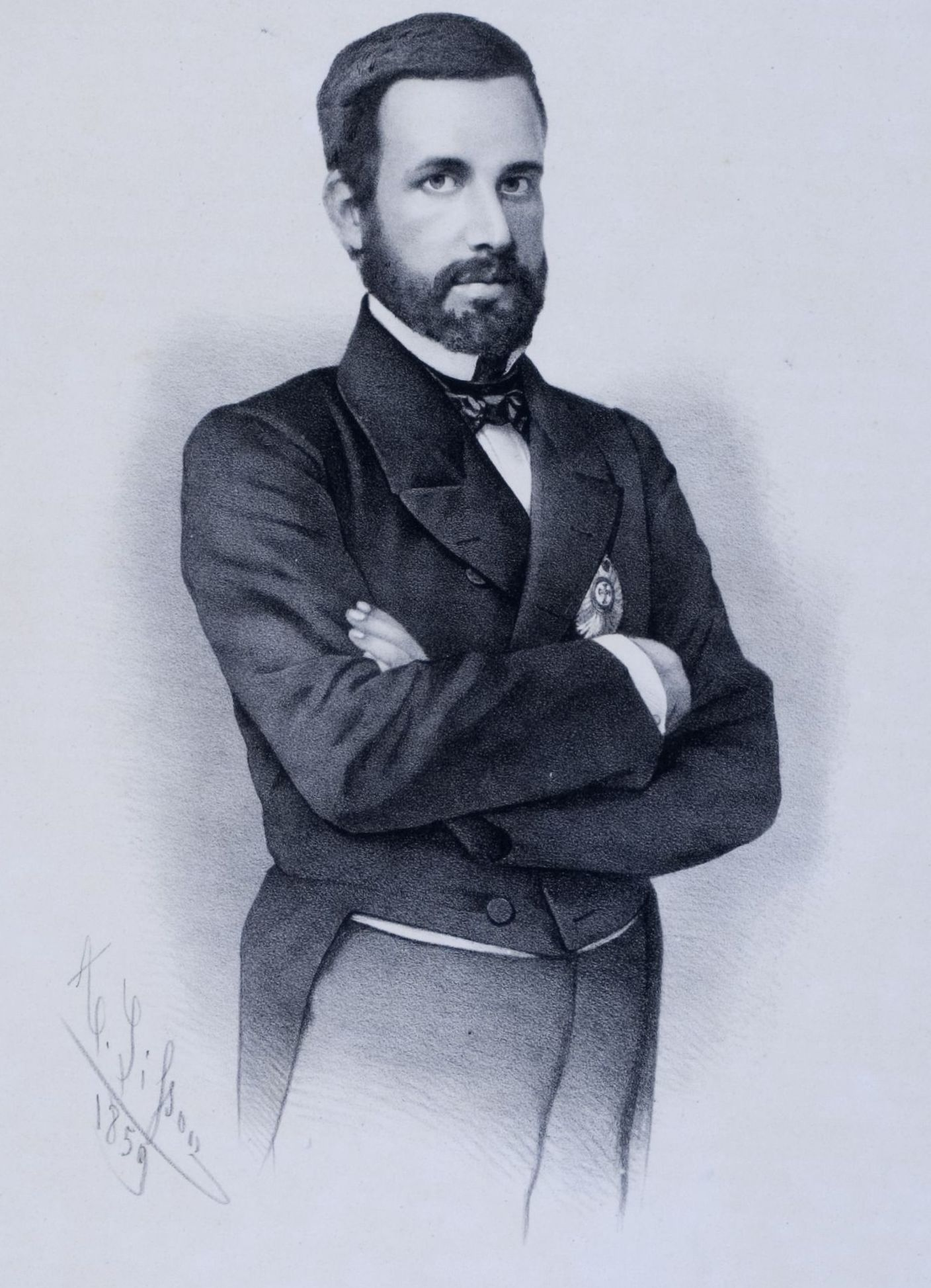 Litografia em preto e branco